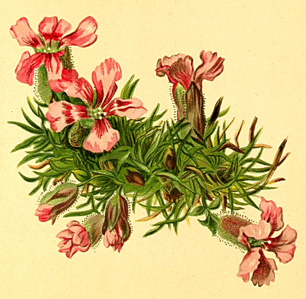 Silene pumilio